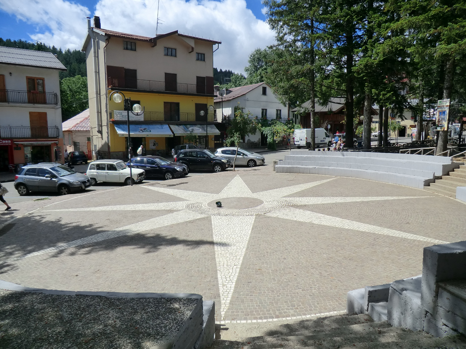 La piazzetta del borgo silano di Camigliatello al termine della centrale Via Roma.